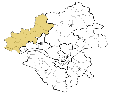 Carte de la septième circonscription de la Loire-Atlantique